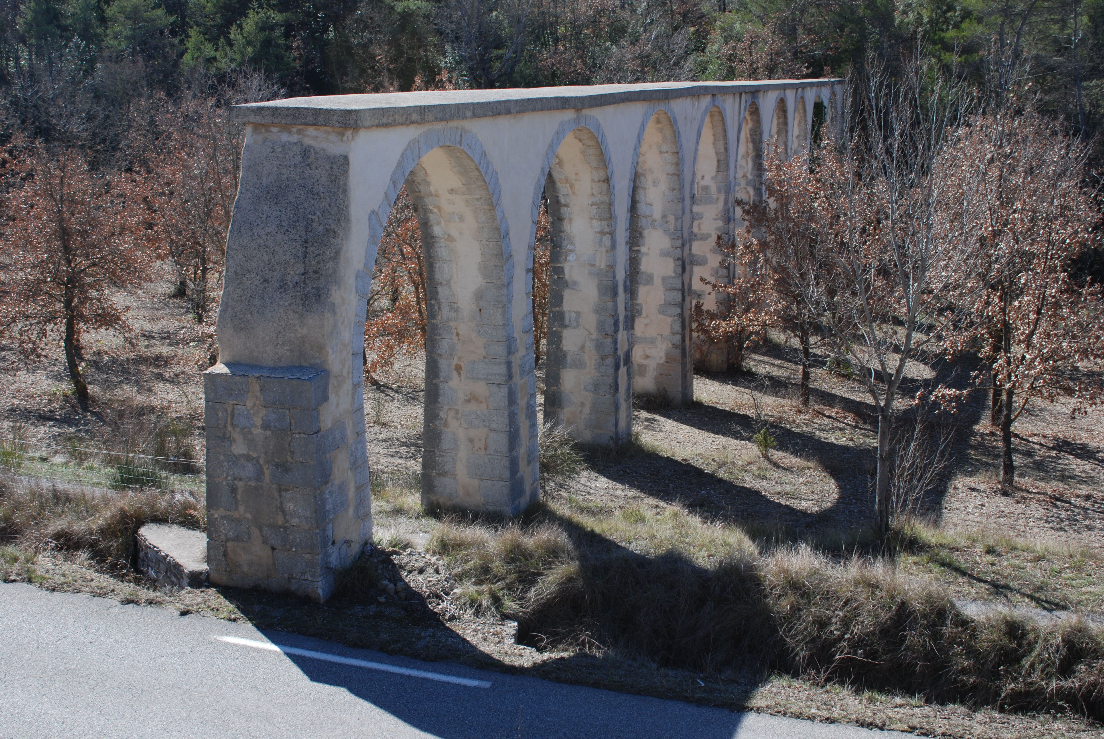 Aquädukt La Verdière, Provence